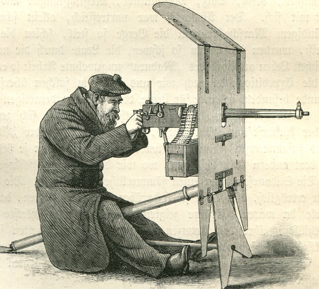 Maxim-Schnellfeuerkanone zu der Expedition von Emin Pasha